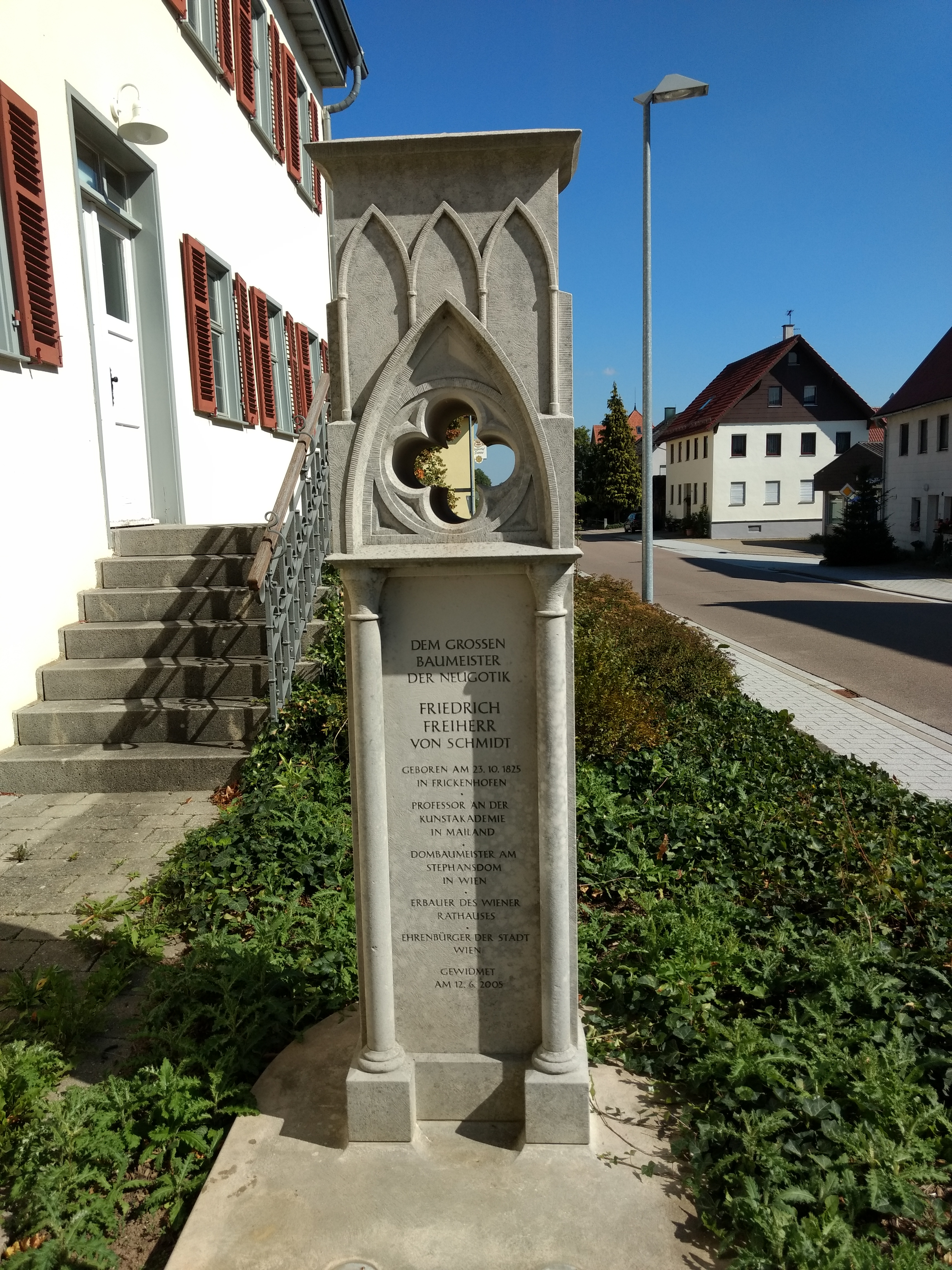 Gschwend Frickenhofen Denkmal Schmid